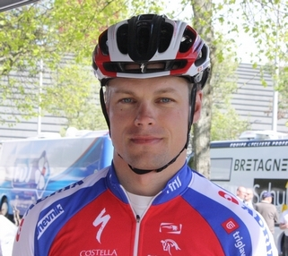 Matev Gnezda au Circuit de la Sarthe 2011